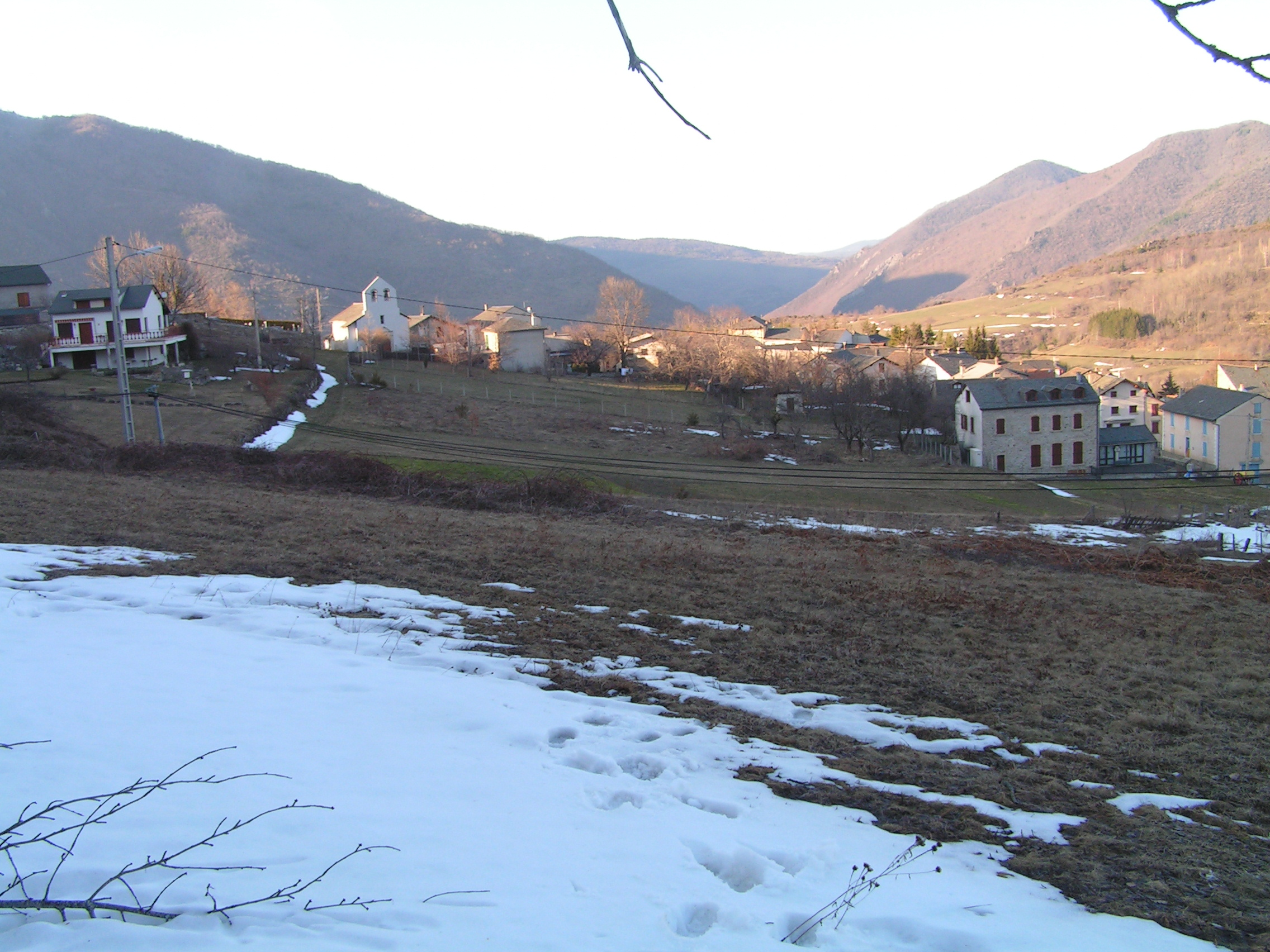 vue d'ensemble Le Pla